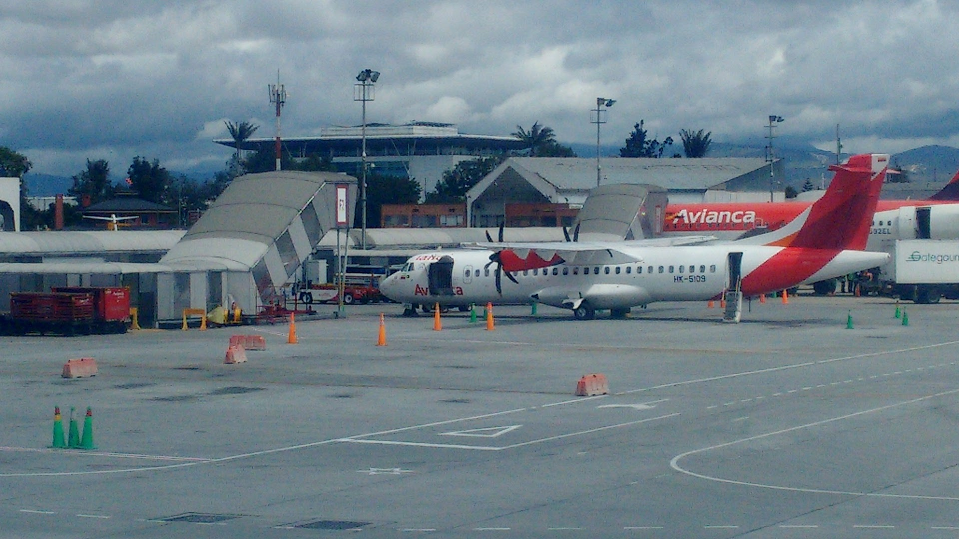 ATR72 de Avianca en el Aeropuerto Internacional ElDorado